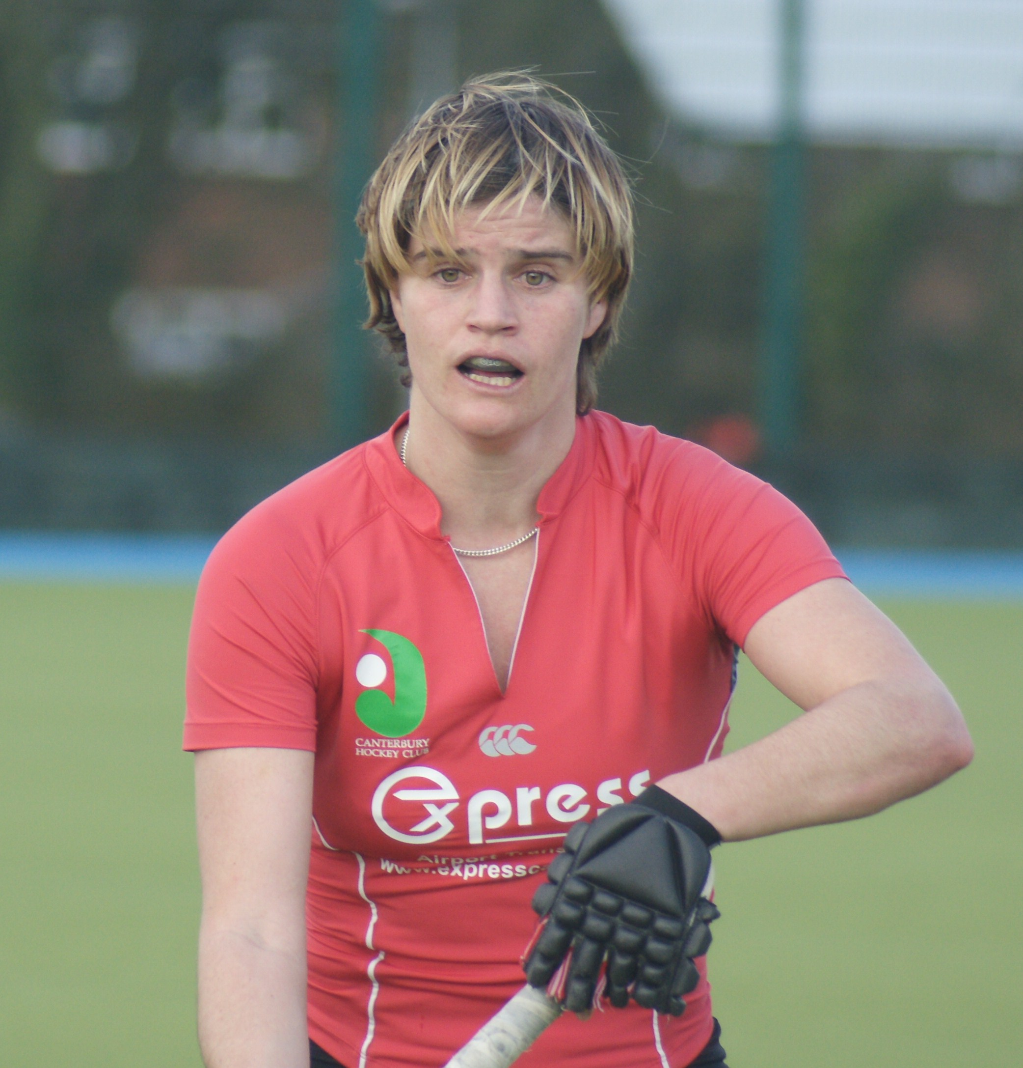 Jennifer Wilson